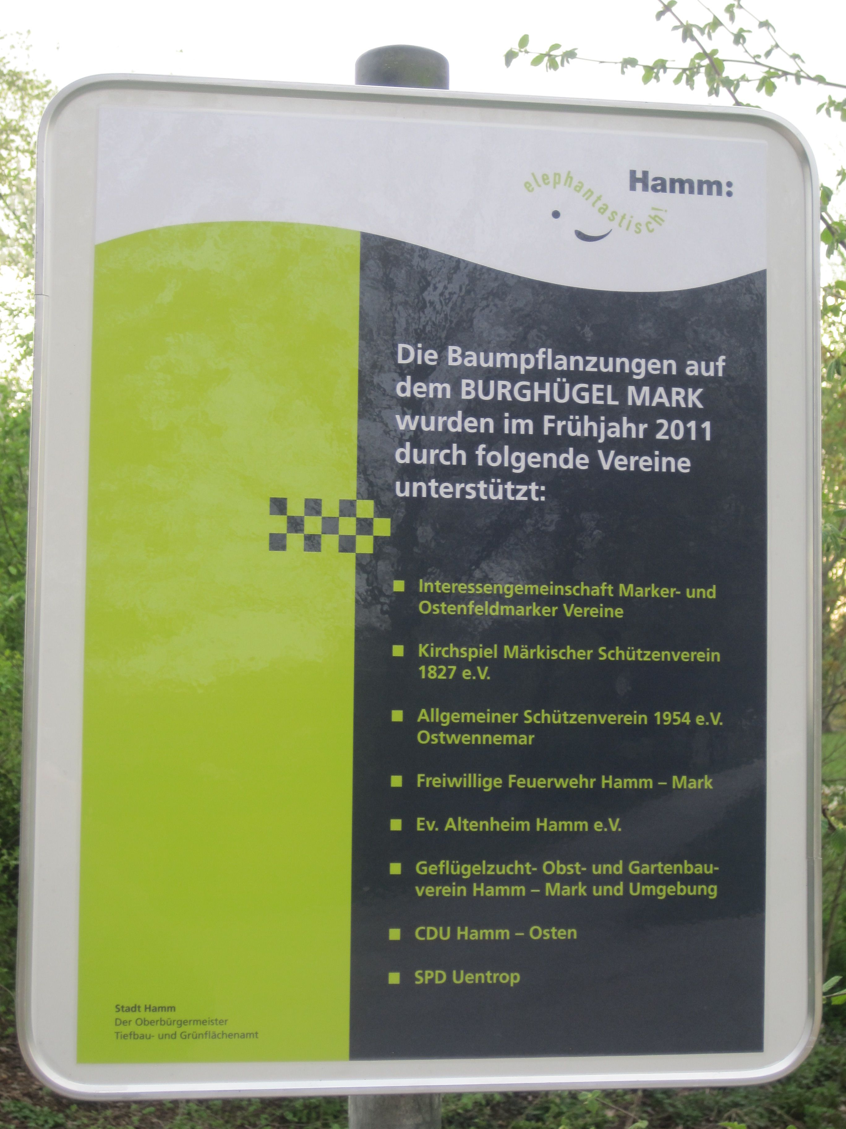 Das Foto zeigt eine neue Informationstafel auf dem Burghügel in Hamm-Mark.